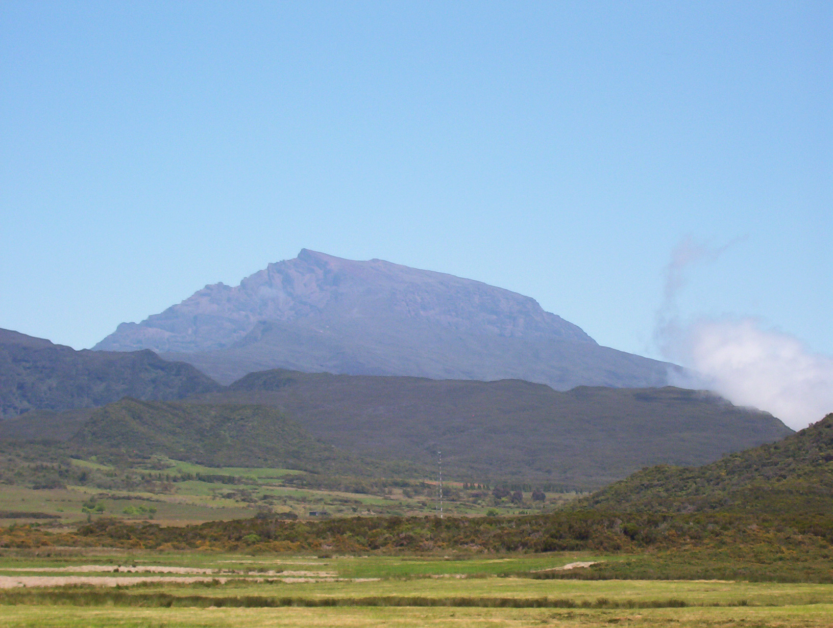 Photo du Piton des neiges, Ile de la Réunion Photo perso, licence libre